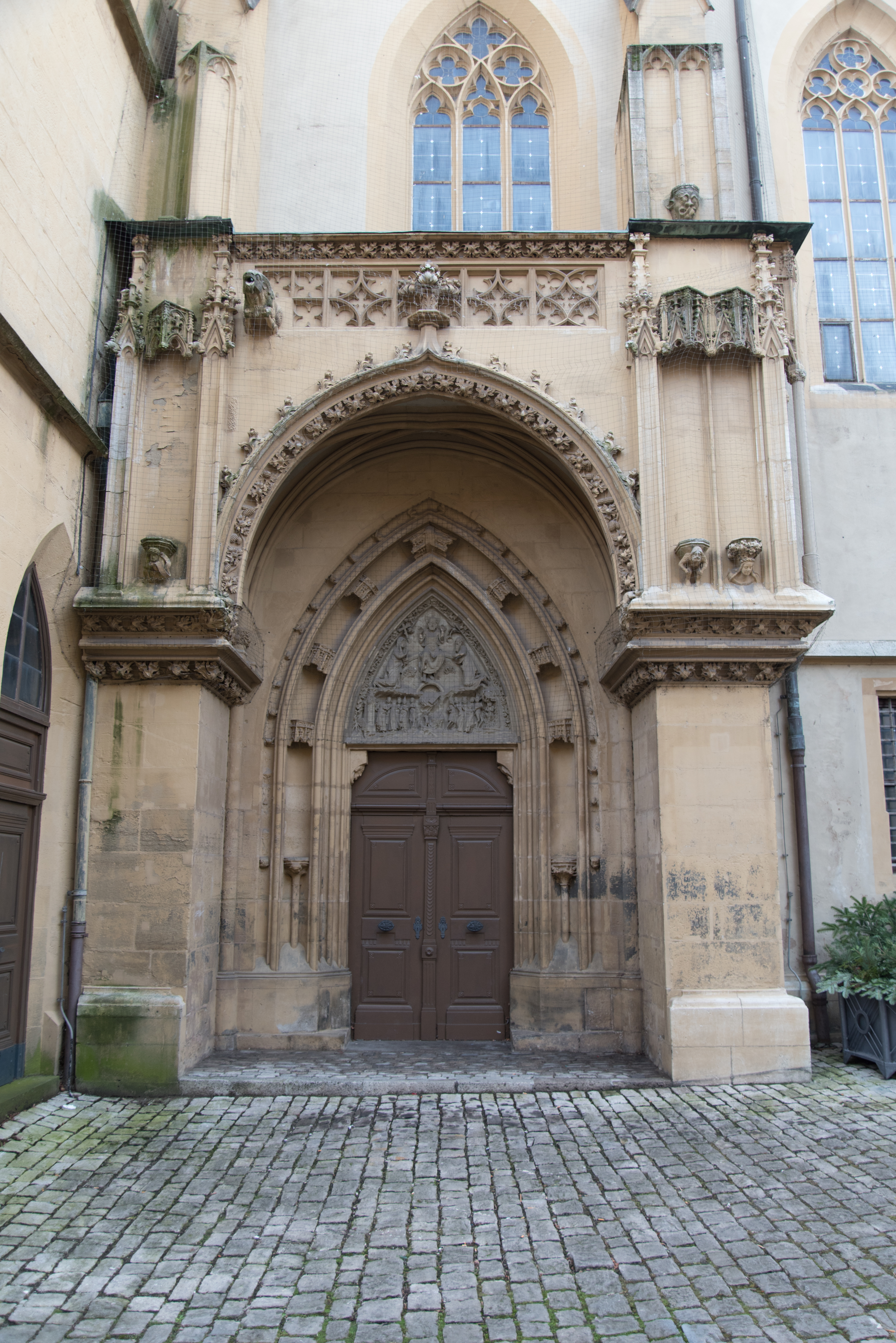 Kitzingen, Sankt Johannes